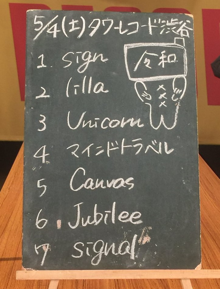 amiinAセトリボード